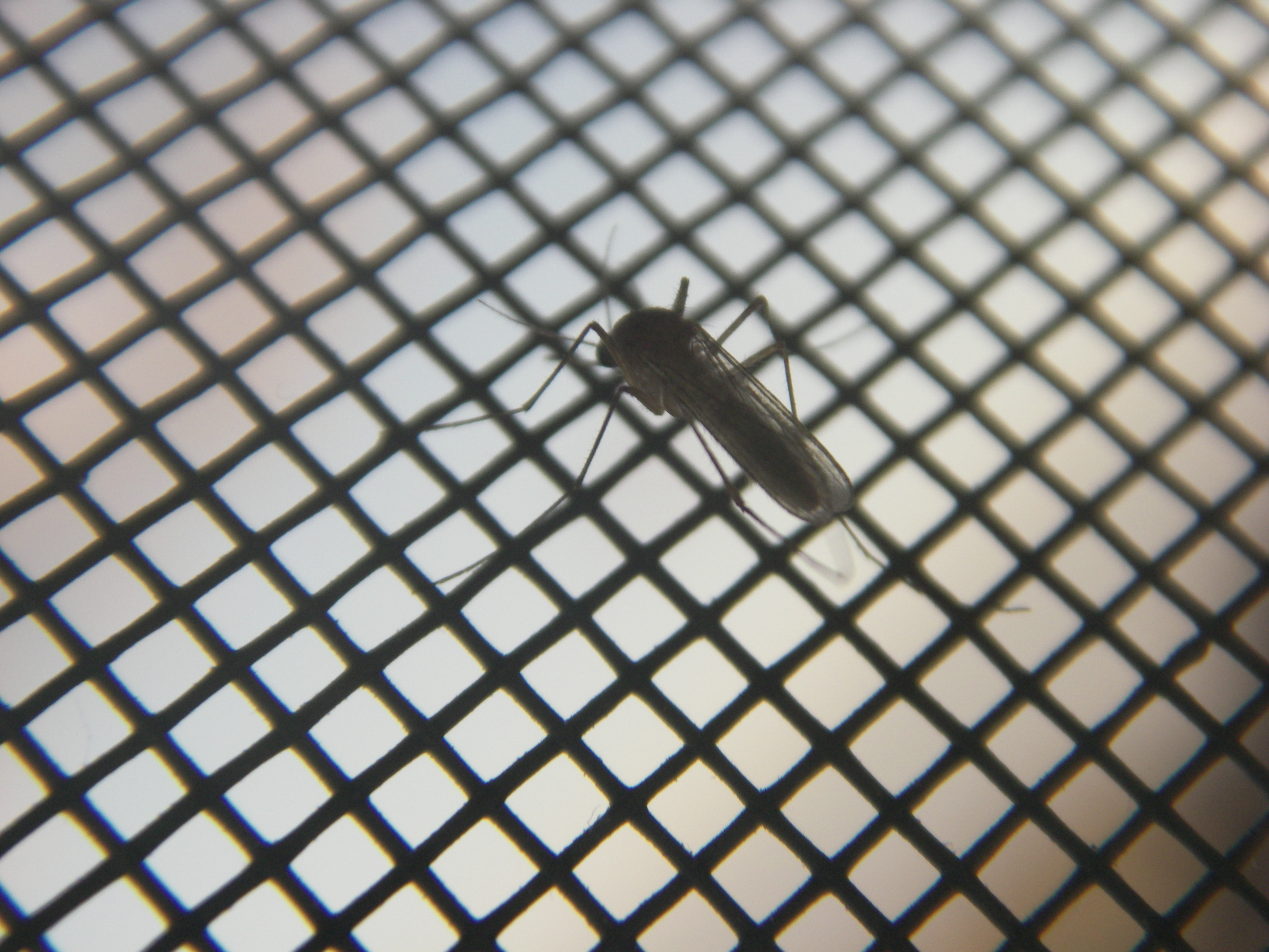 Комар на москитной сетке